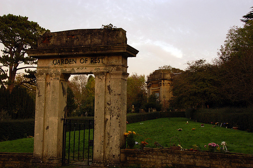 Arnos Vale, Bristol.